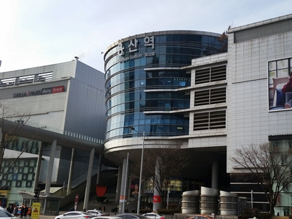 용산역